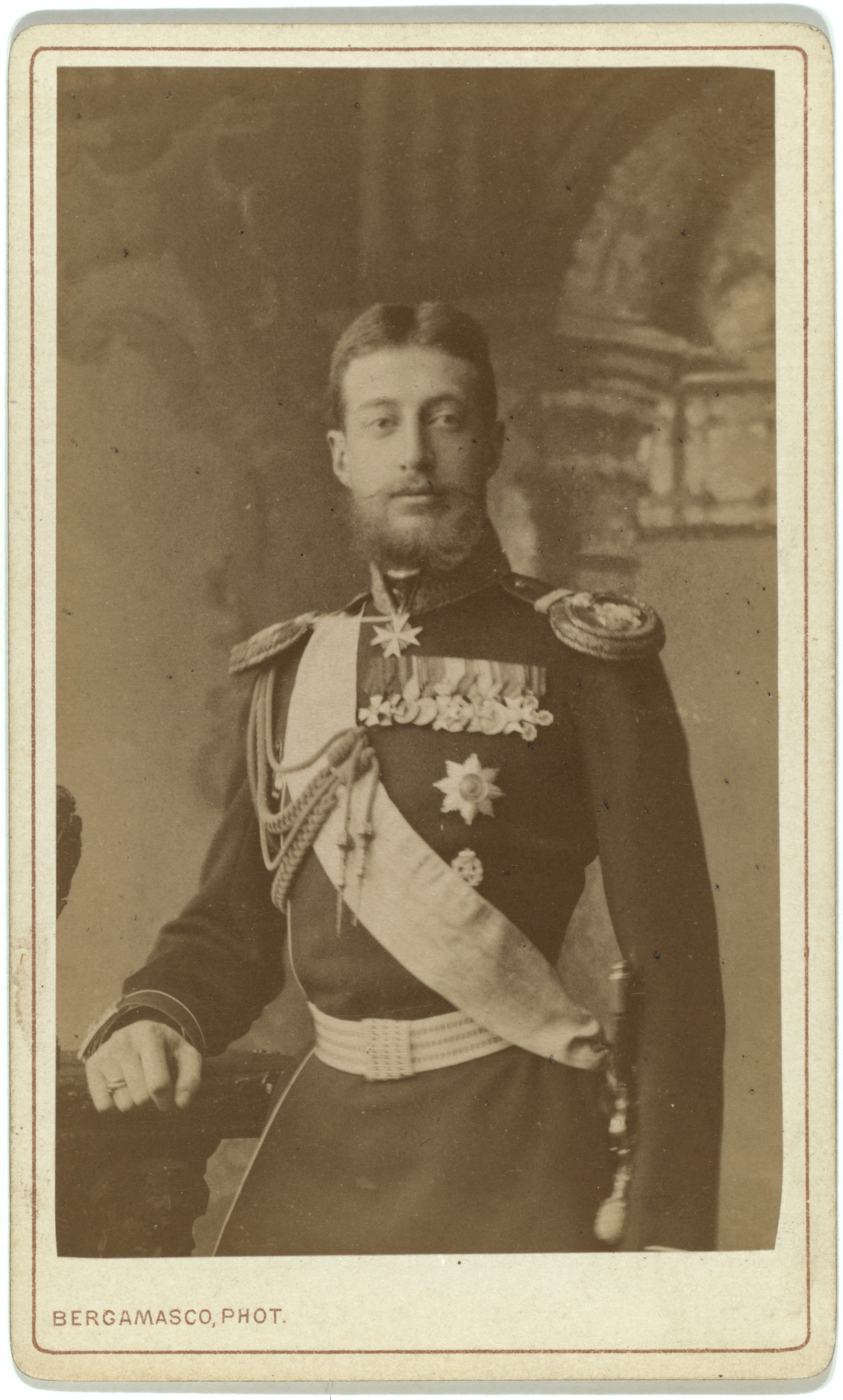 Grand Duke Konstantin Konstantinovich